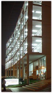 Universidad Privada Franz Tamayo - Sede Santa Cruz